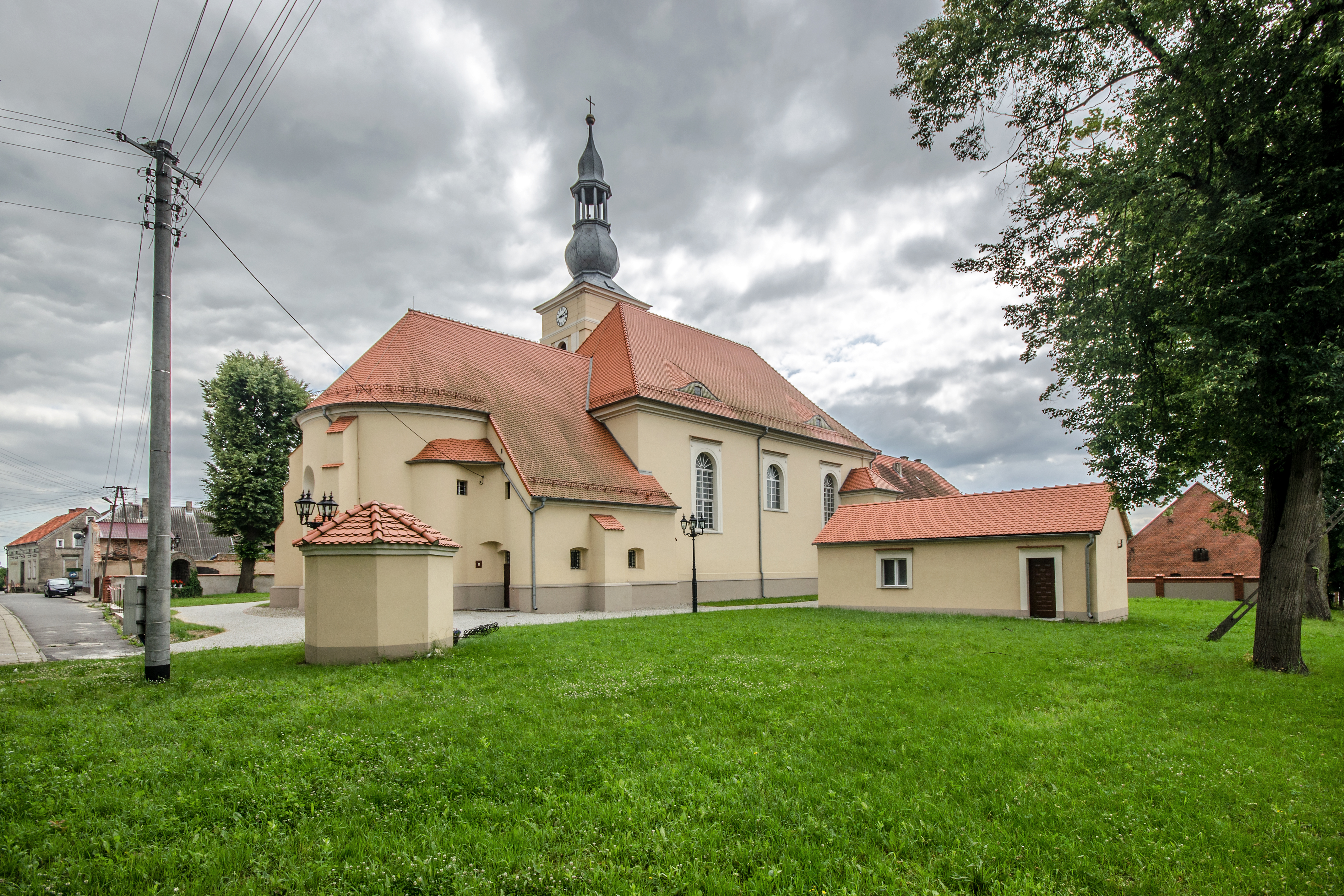 Rychtal, kościół par. p.w. Ścięcia św. Jana Chrzciciela, 1784-1785